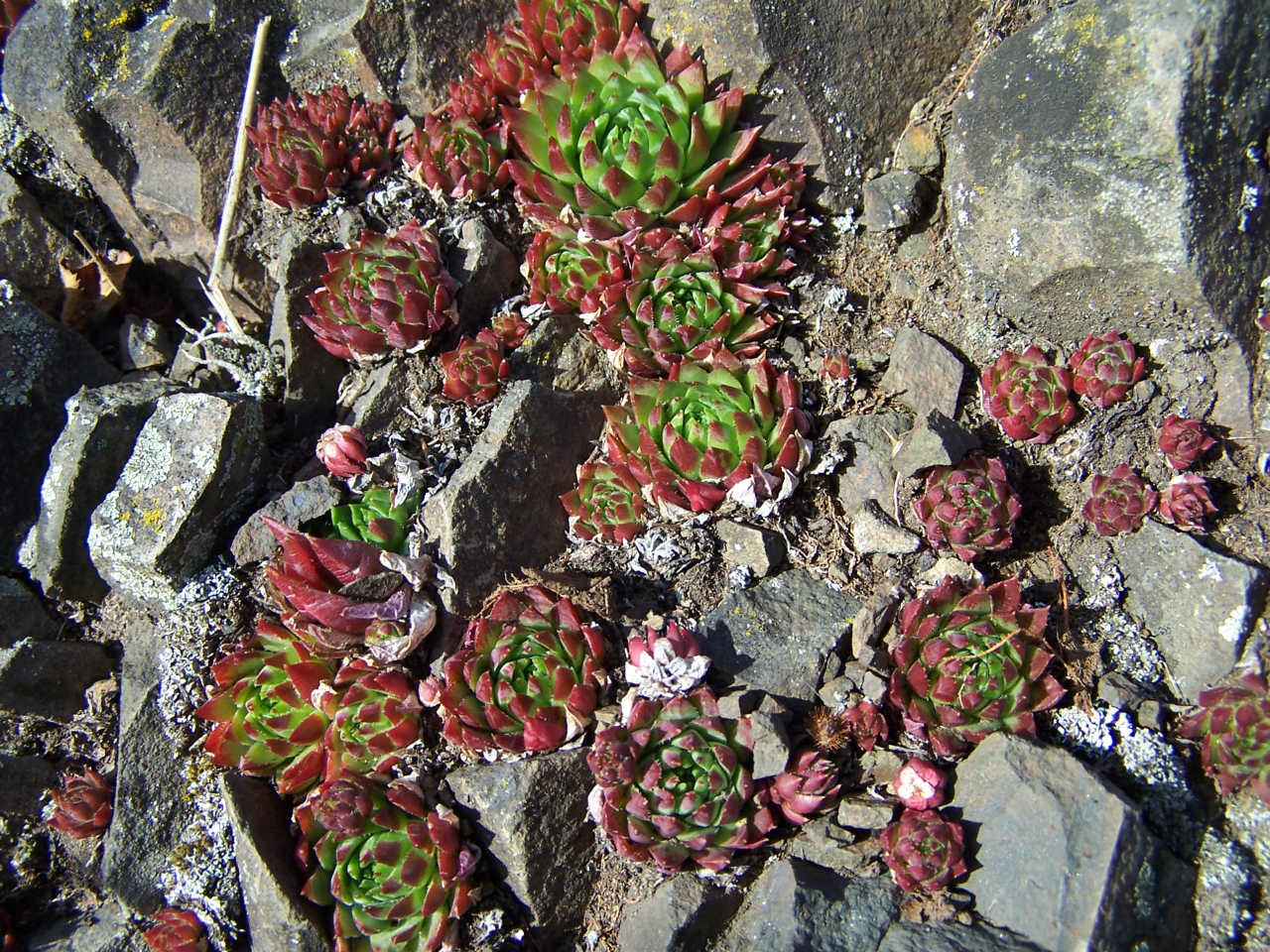 Bazaltowa Skałka (Pieniny. Biała Woda)